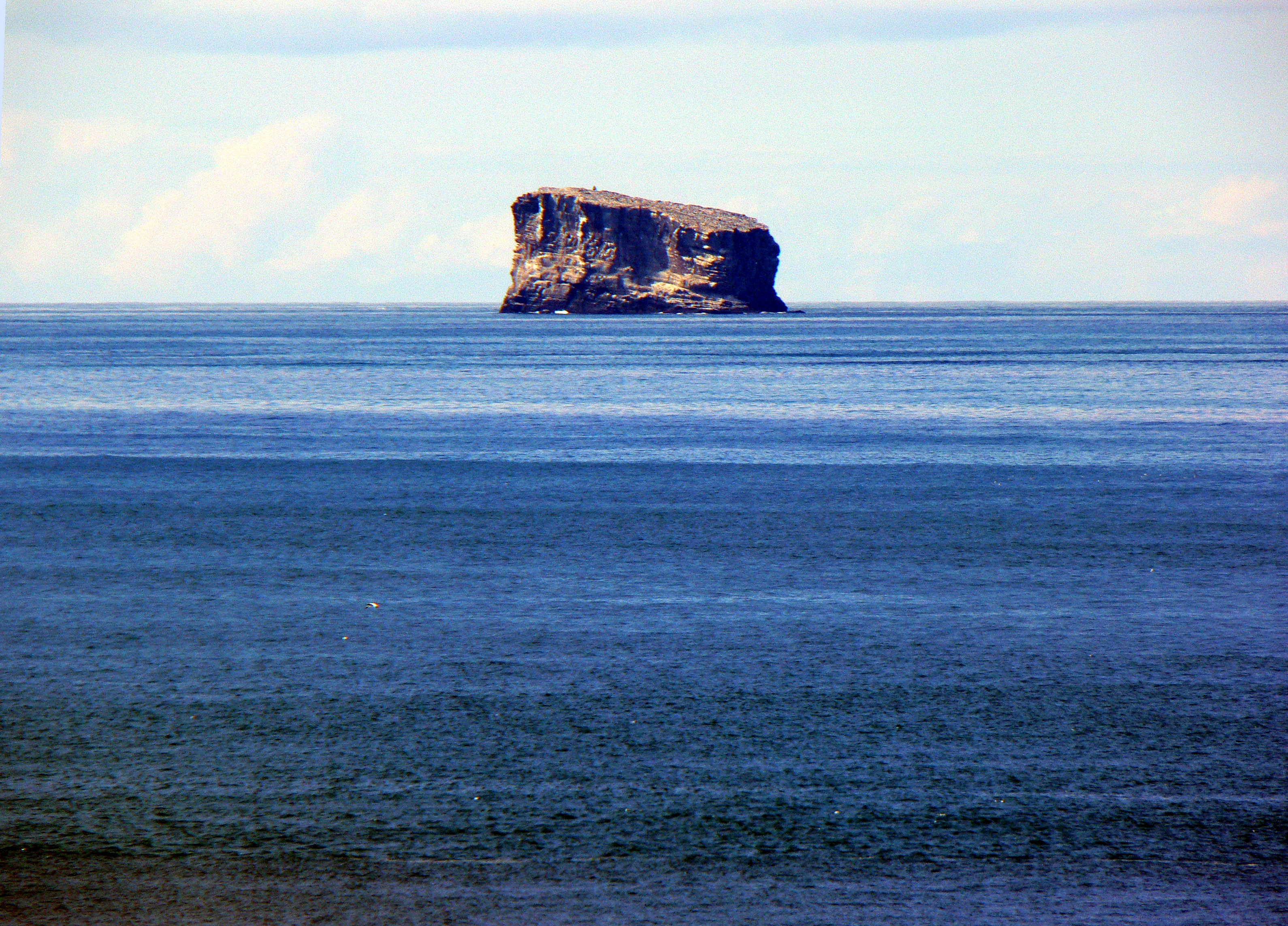 Eldey, eine Vogelinsel vor Reykjanes in Island mit der größten Kolonie der Basstölpel auf der Welt. Die letzte Zählung ergab 70.000 Exemplare.